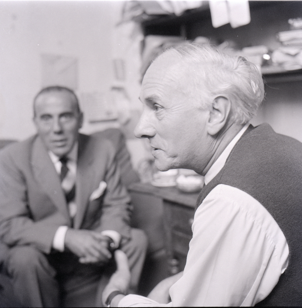 Servizio fotografico : Italia, 1961 / Paolo Monti. - Buste: 19, Fototipi: 20 : Negativo b/n, gelatina bromuro d'argento/ pellicola ; 6x6. - ((Serie costituita da 19 buste di carta, tenute insieme da graffetta, identificate con i nn.: R4489, R4490, R4491, R4492, R4493, R4494, R4495, R4496, R4497, R4498, R4499, R4490, R4491, R4492, R4493, R4494, R4495, R4496, R4497, R4498, R4499, R4500, R4501, R4502, R4503, R4504, R4505, R4506, R4507/4508. - Sulla busta 4489: "1961 Schneider"